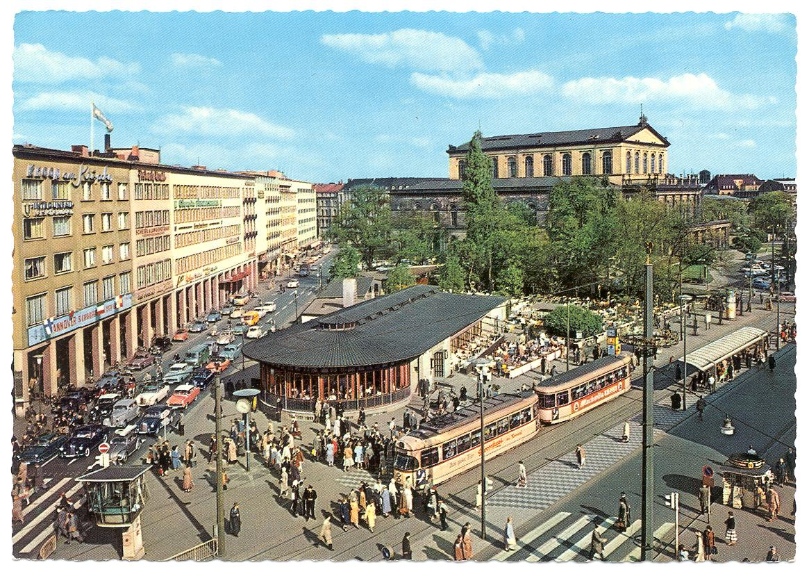 Hannover, Kröpcke, Postkarte 1960er Jahre